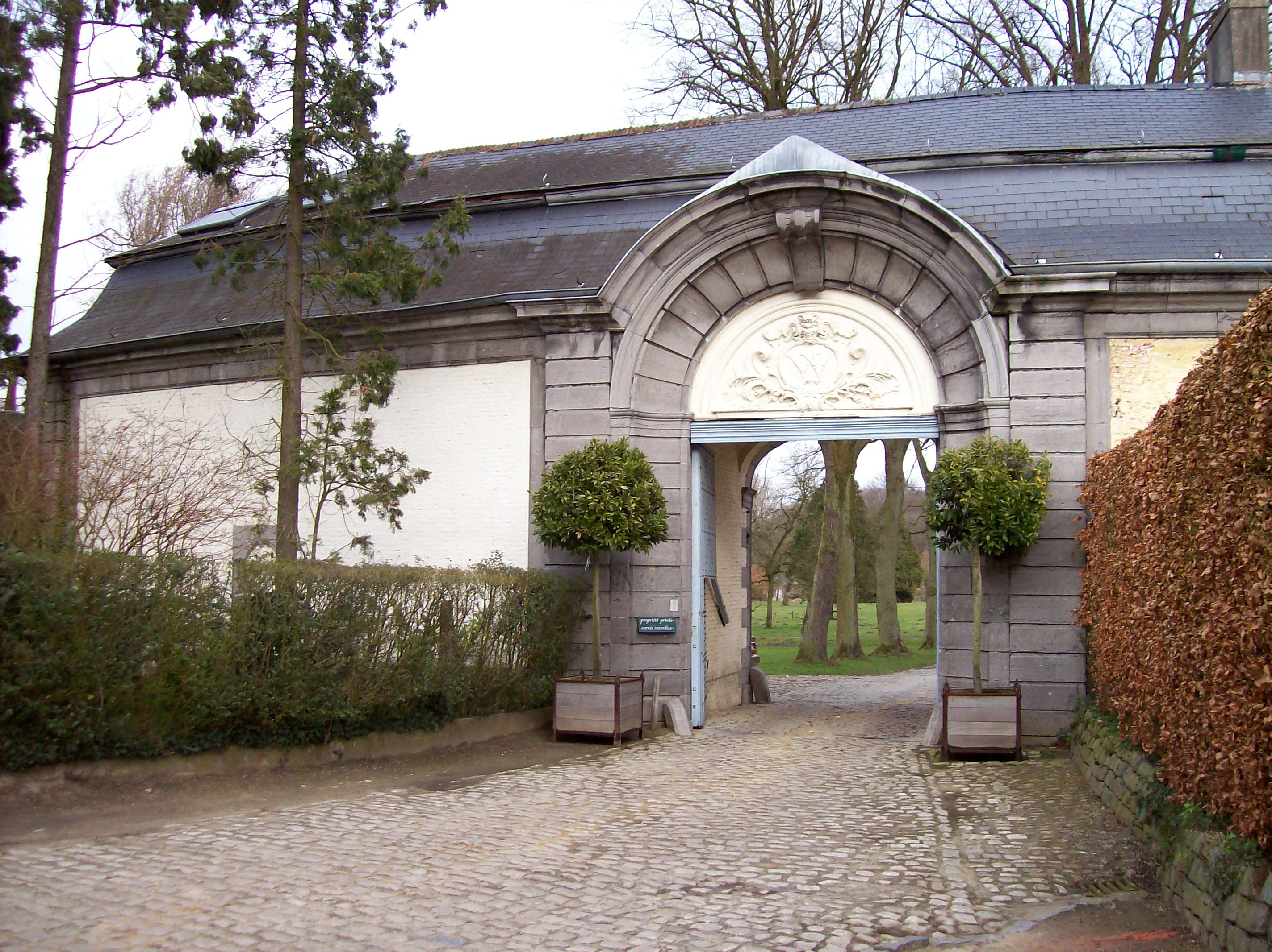 Portail d'entrée de l'ancienne abbaye d'Aywiers à Couture-Saint-Germain, en Belgique